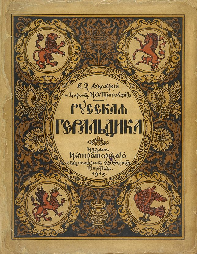 Лукомский, В.К., Типольт, Н.А., барон. Русская геральдика. Руководство к составлению и описанию гербов. Издание Императорского Общества Поощрения Художеств. Пг.: Сенатская тип., 1915. [8], 51 c., 27 л. ил. 32,6 х 25 см. В издательской иллюстрированной обложке по рис. И. Билибина. реставрация титульного листа. Настоящее издание «Русской геральдики» было задумано Императорским Обществом поощрения художеств с целью выпустить в свет полноценное справочное руководство по гербоведению. Книга написана выдающимися специалистами по русской геральдике В.К. Лукомским и Н.А.Типольтом. Иллюстрации были выполнены под руководством И.А. Билибина. Над изданием книги работала комиссия, в которую входили лучшие художественные силы той эпохи, в том числе Н.К. Рерих, Н.Е. Макаренко, С.П. Яремич. Иллюстрации были выполнены при участии класса графики Общества поощрения художеств. Для книги был использован подлинный русский шрифт Бодони, матрицы которого хранились в Сенатской типографии.